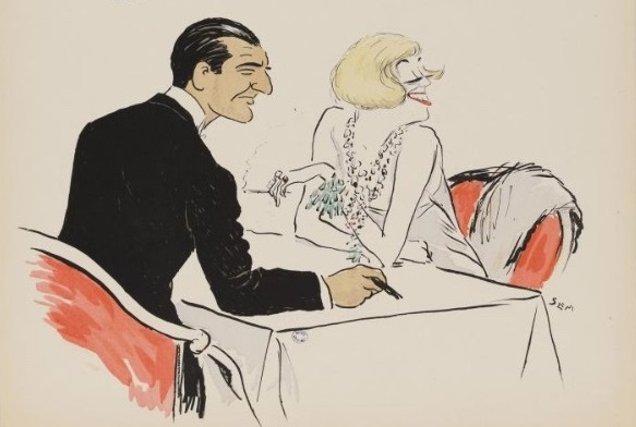 Détail d'un dessin humoristique de Sem (Georges Goursat, 1863-1934) extrait de l'album Le Nouveau Monde (3ème série) : M. et Mme André Citroën et un couple non identifié.